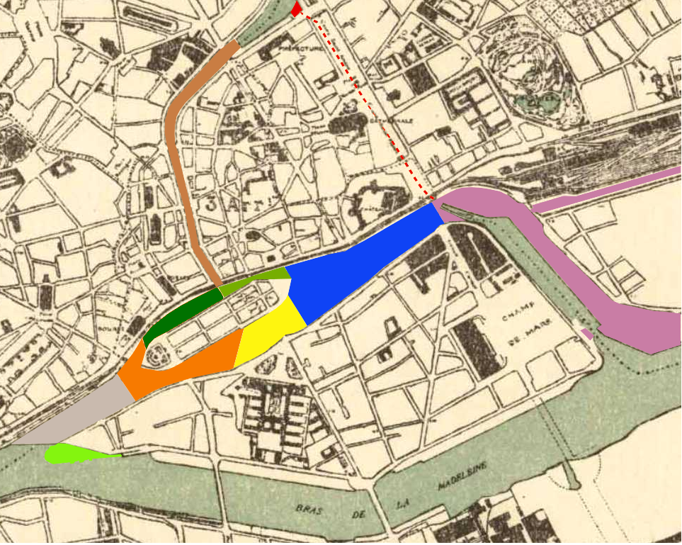 Schéma des phases des comblements de Nantes, sur la base d'une carte de 1930.